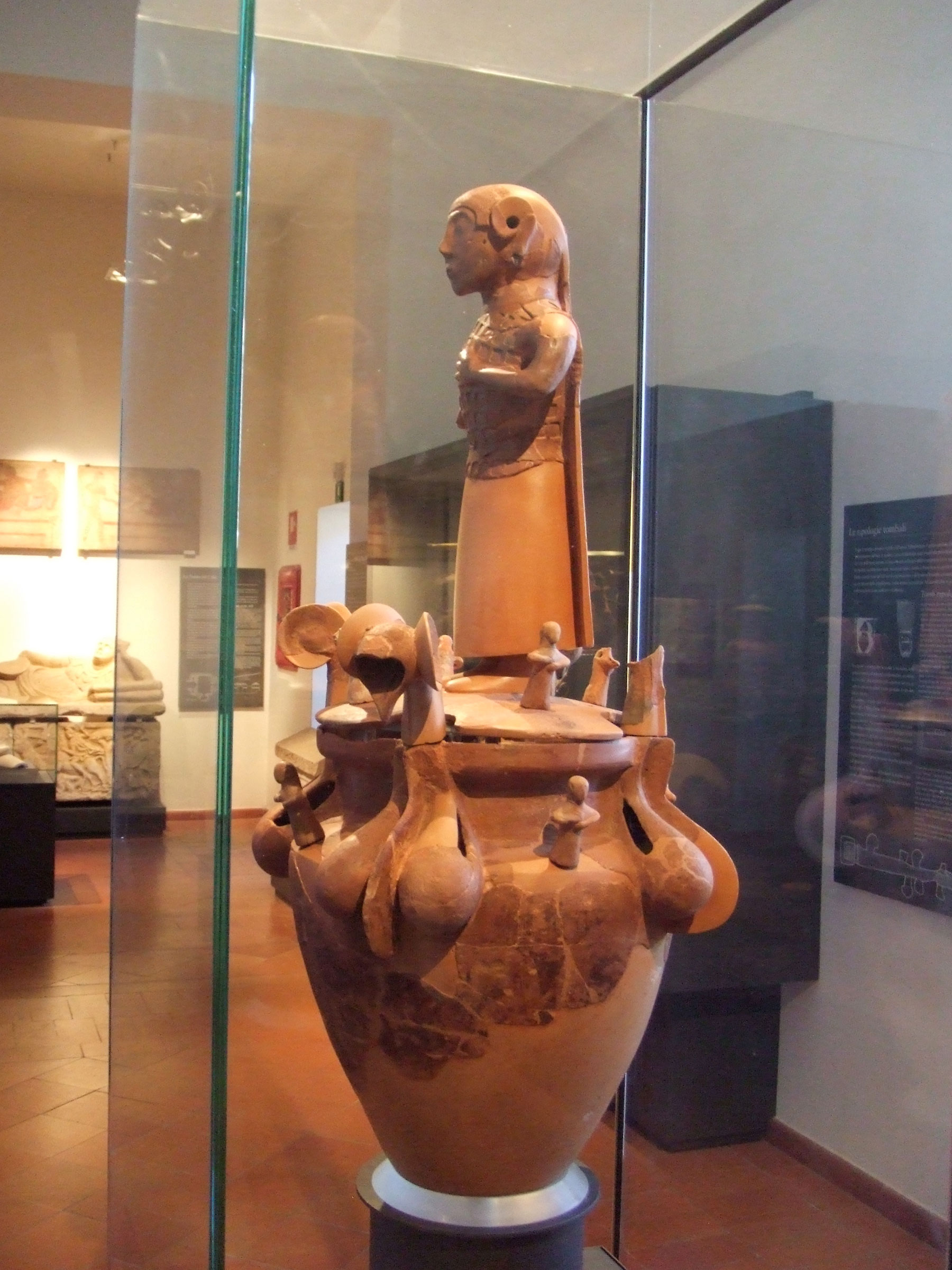 Canope de Chiusi - vitrines du Museo archeologico nazionale di Chiusi